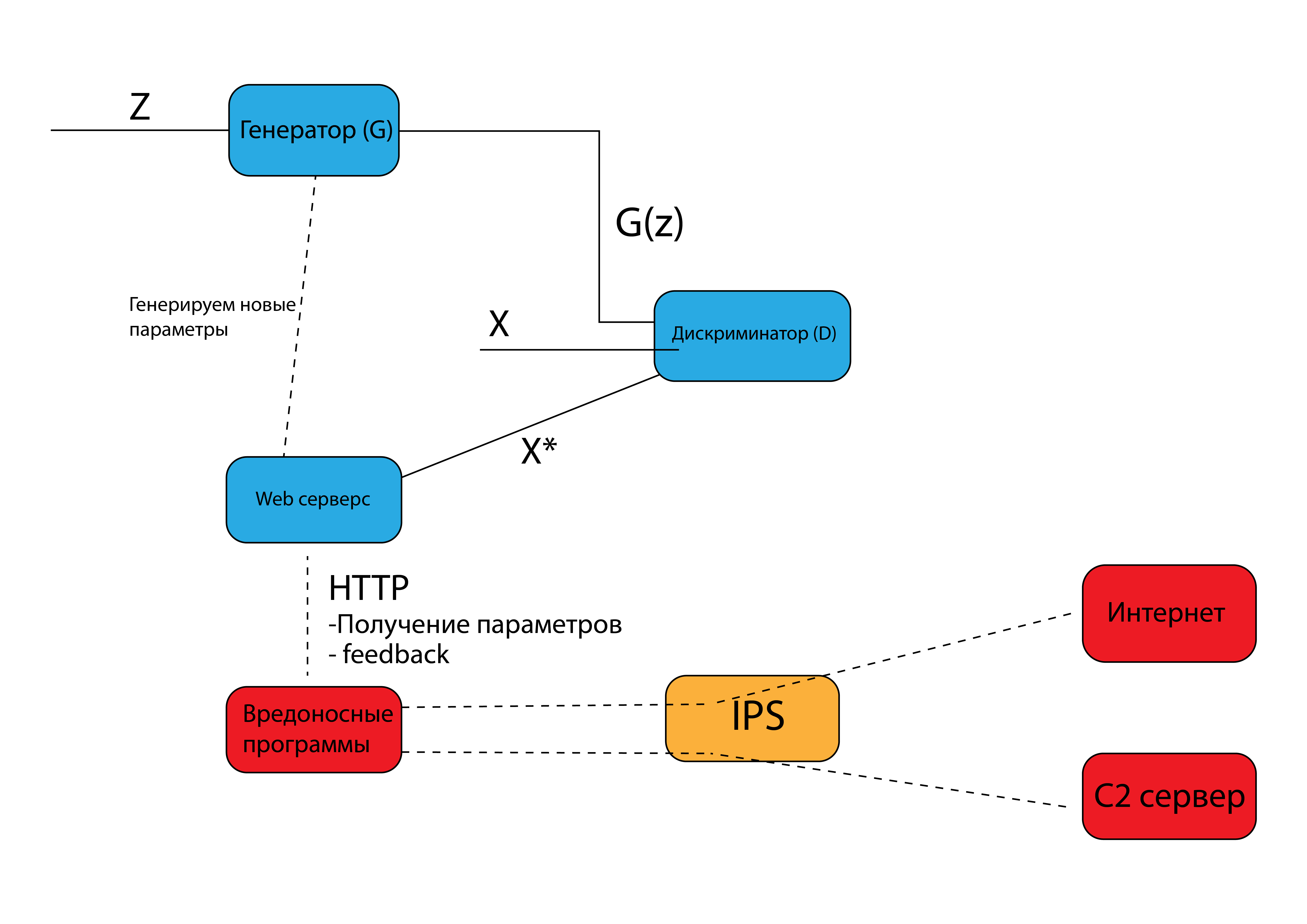 Схема генерации состезательной Сети